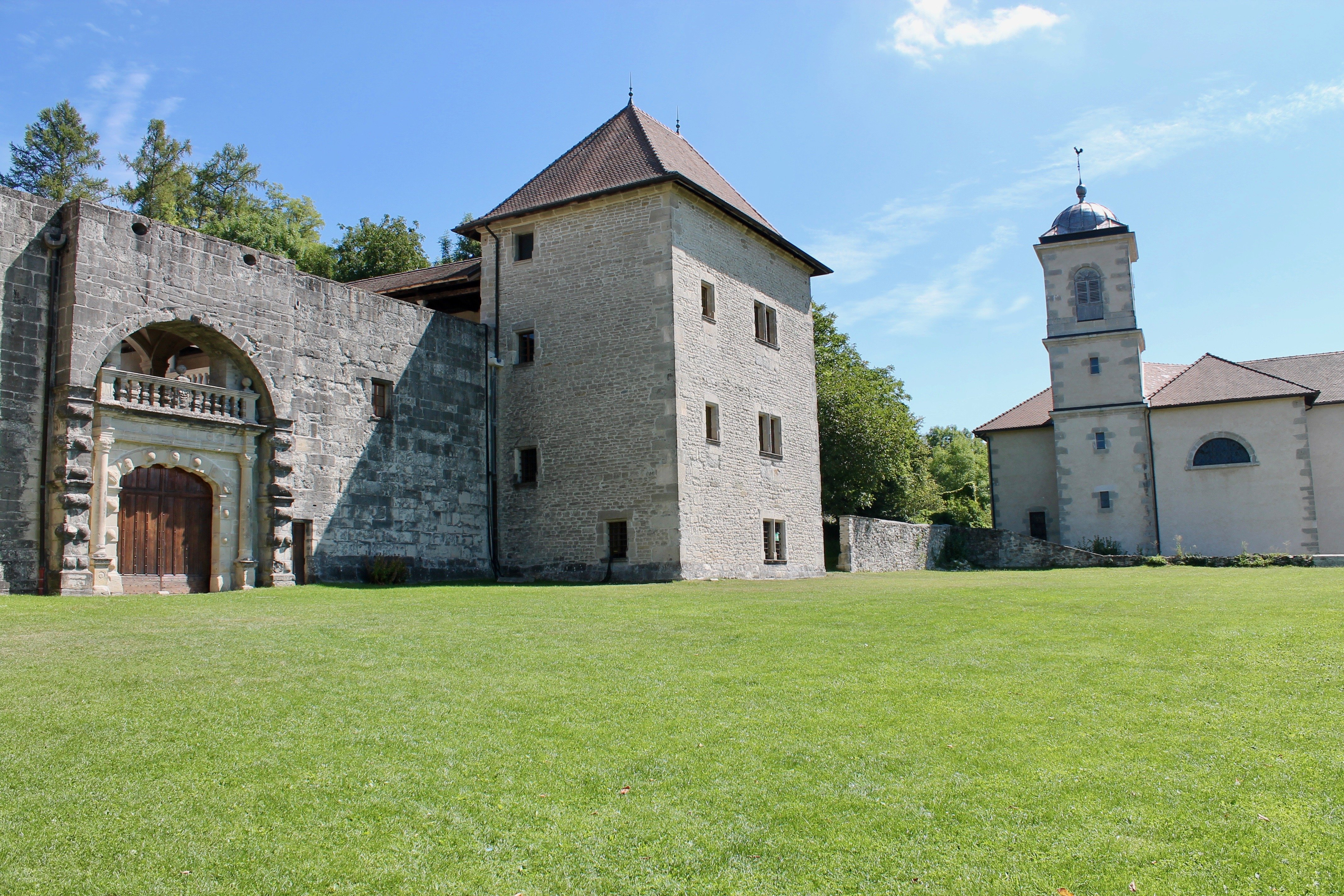 Façade du château et église Saint-Étienne de Clermont.